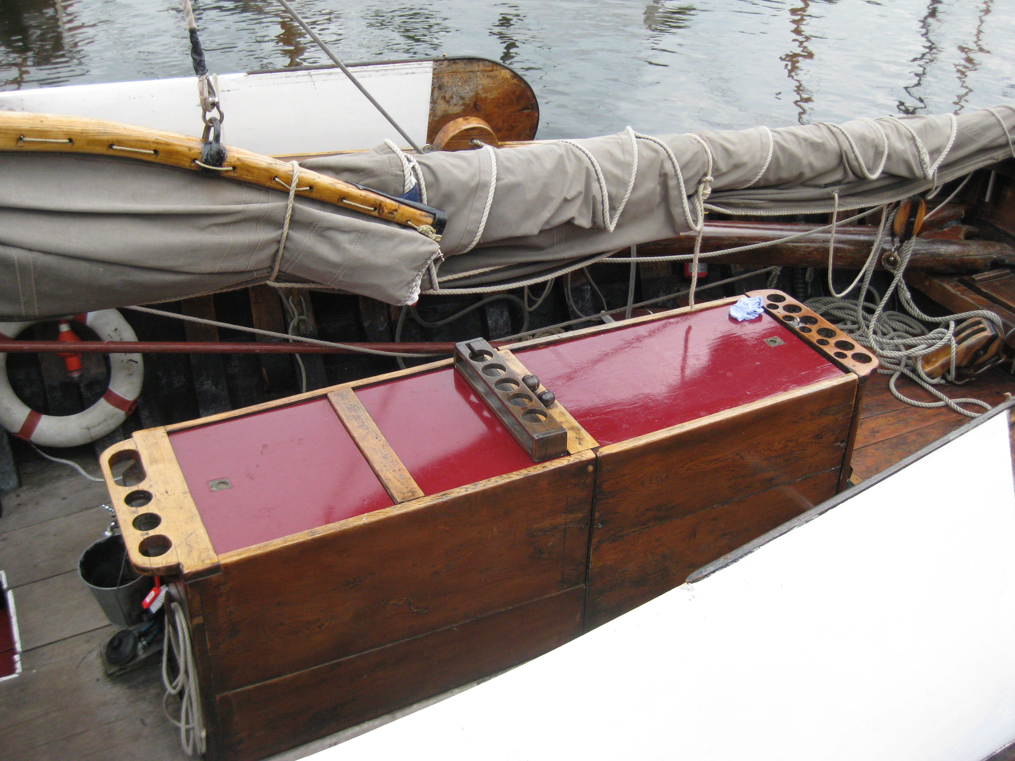 Visbun in een botter (schip)